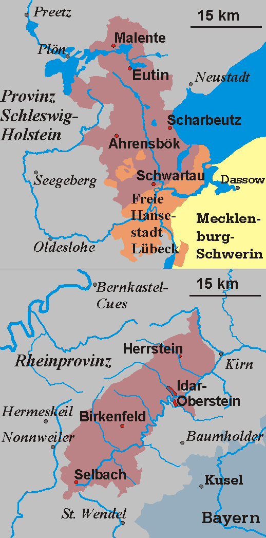 Karte Fürstentümer Lübeck und Birkenfeld